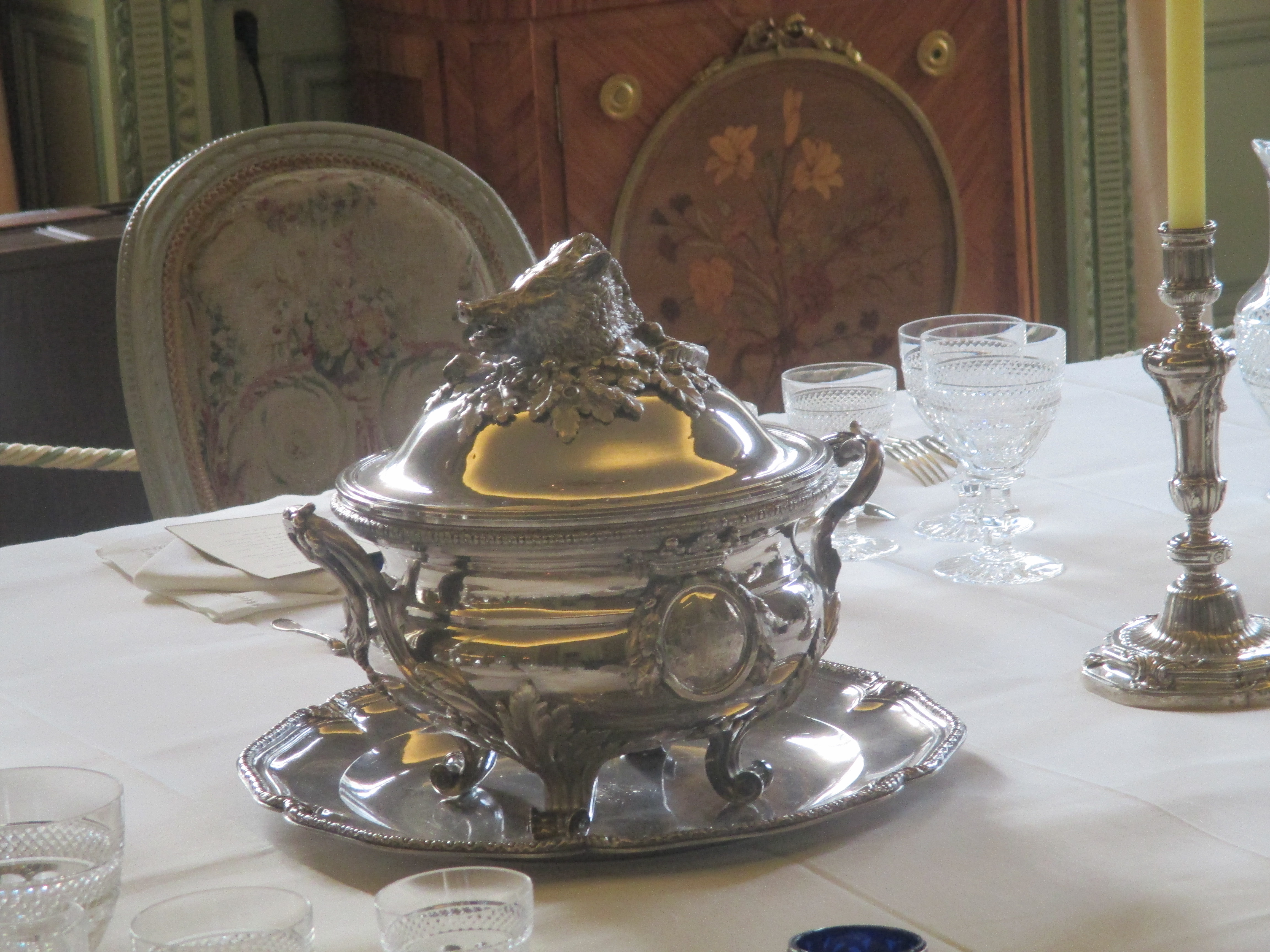 Pot à oille en argent massif avec hure sur le couvercle. Service Orloff commandé par Catherine la Grande pour son favori le comte Orloff (1770-1771, Roettiers), musée Camondo.